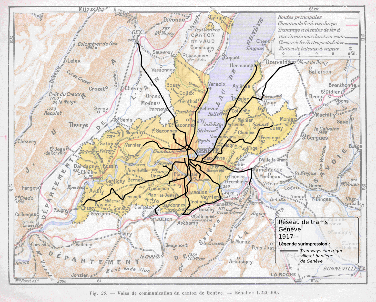 Plan du réseau des tramways électriques de Genève en 1917. Carte de fond : Manuel-atlas destiné aux écoles primaires, W. Rosier, Payot Lausanne et Burkhardt Genève, 1918. Carte p. 23, description p. 22-24.